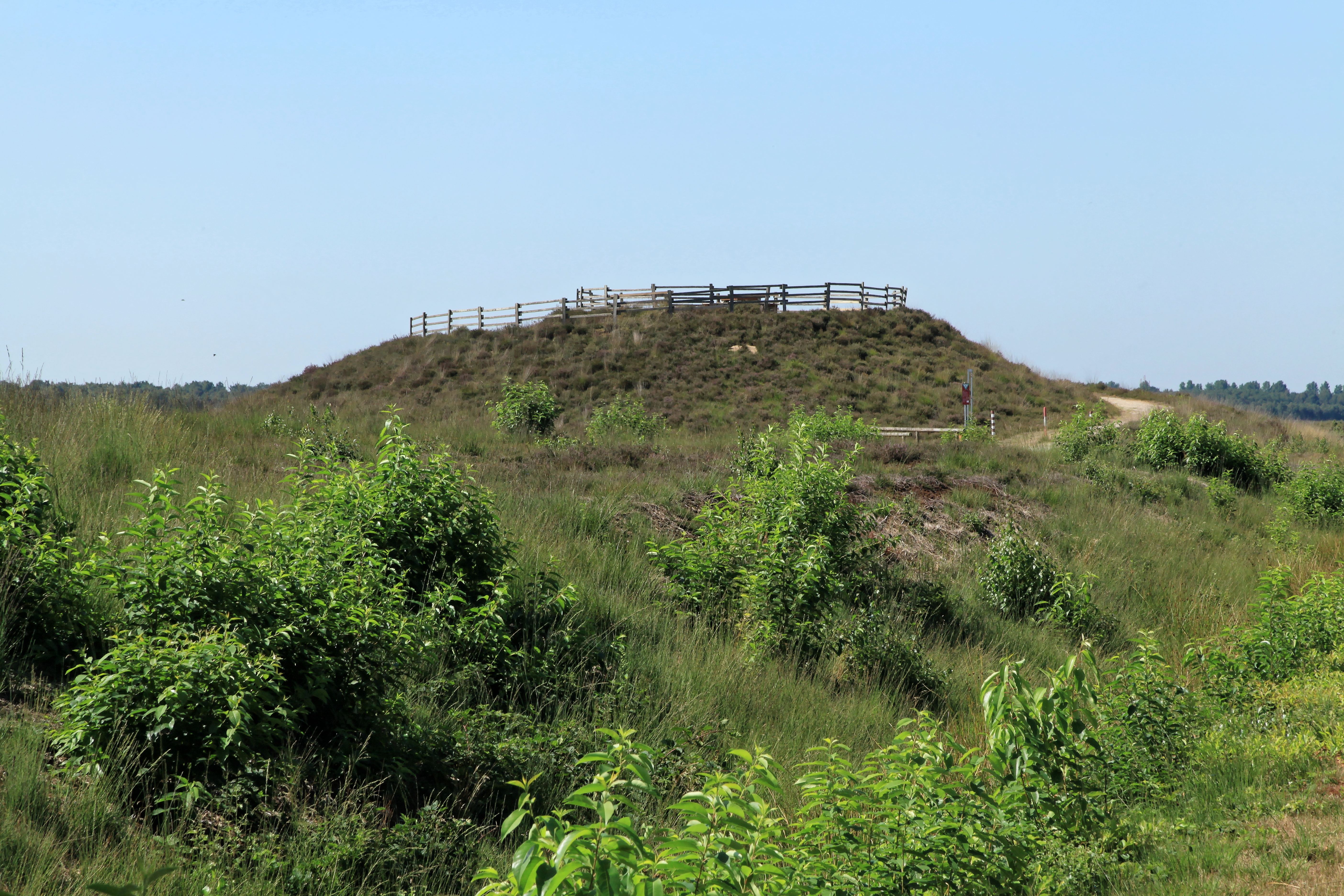 Aussichtshügel, Zum Hügel im Dalum-Wietmarscher Moor in Geeste